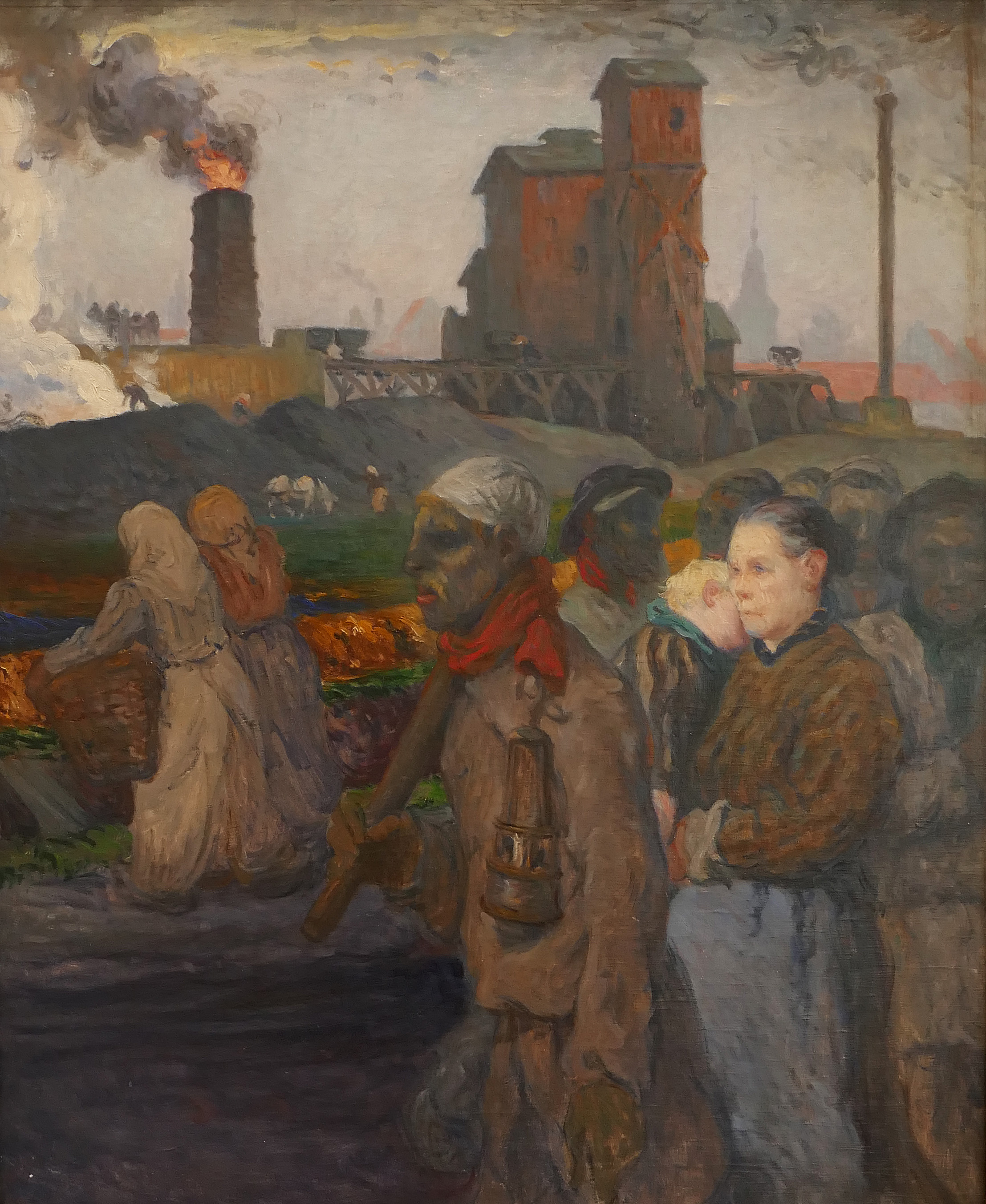 Jules-Gustave Besson, Mineurs, vers 1900. Huile sur toile. Musée de l'Ermitage, Saint-Pétersbourg. This is a faithful photographic reproduction of a two-dimensional, public domain work of art. The work of art itself is in the public domain for the following reason: The author died in 1942, so this work is in the public domain in its country of origin and other countries and areas where the copyright term is the author's life plus 75 years or less. You must also include a United States public domain tag to indicate why this work is in the public domain in the United States. Note that a few countries have copyright terms longer than 75 years: Mexico has 100 years, Jamaica has 95 years, and Colombia has 80 years. This image may not be in the public domain in these countries, which moreover do not implement the rule of the shorter term. Côte d'Ivoire has a general copyright term of 99 years, but it does implement the rule of the shorter term. This file has been identified as being free of known restrictions under copyright law, including all related and neighboring rights. The official position taken by the Wikimedia Foundation is that "faithful reproductions of two-dimensional public domain works of art are public domain". This photographic reproduction is therefore also considered to be in the public domain in the United States. In other jurisdictions, re-use of this content may be restricted; see Reuse of PD-Art photographs for details.